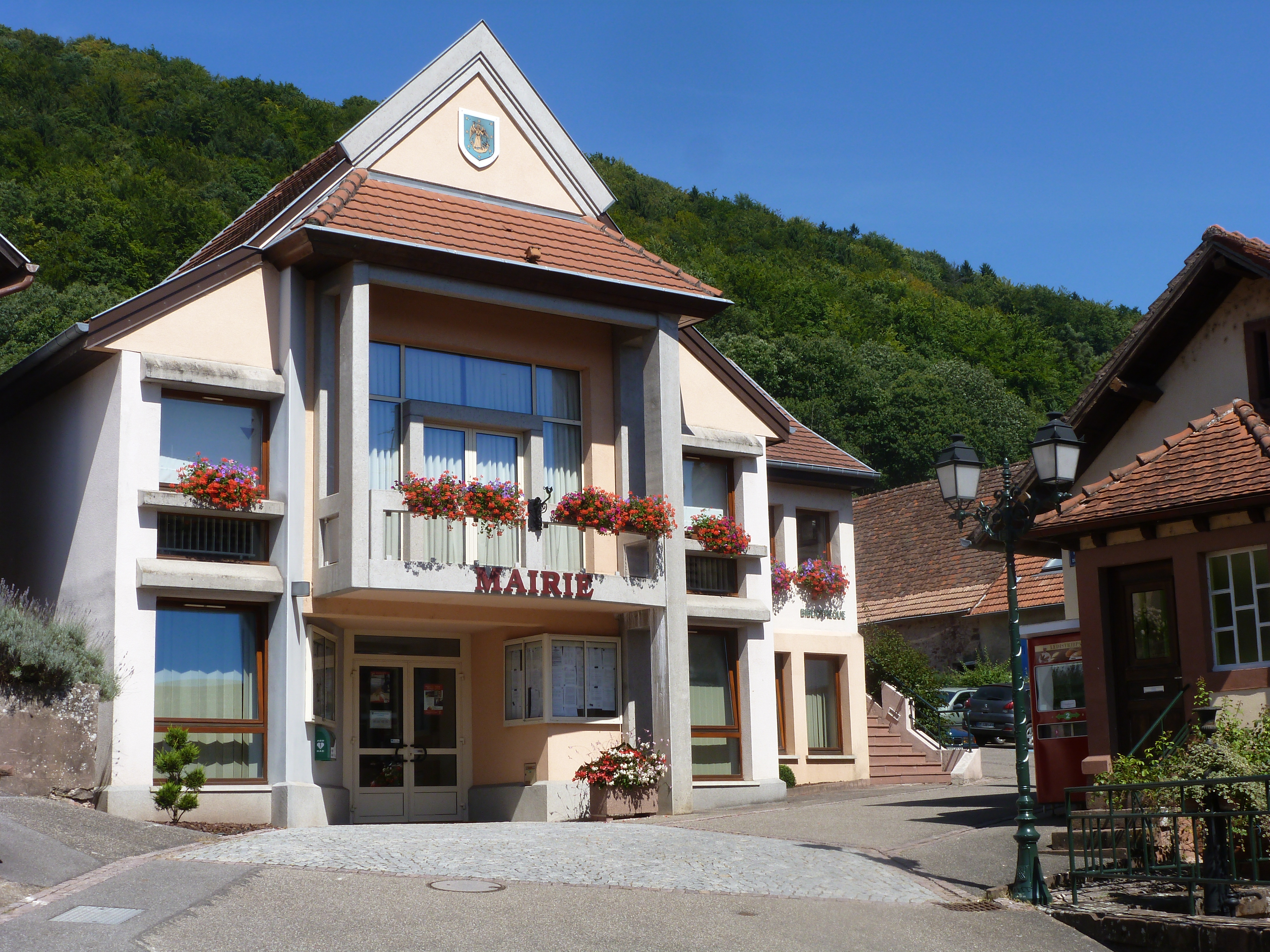 Mairie d’Ernolsheim-lès-Saverne.